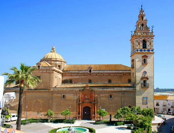 Parroquia Nª Sª de la Granada, Moguer. (Huelva, España).